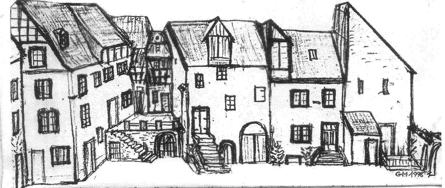 Posthof Lieser Panorama, Alter Posthof Lieser Ostseite, Panoramazeichnung, Poststation Lieser